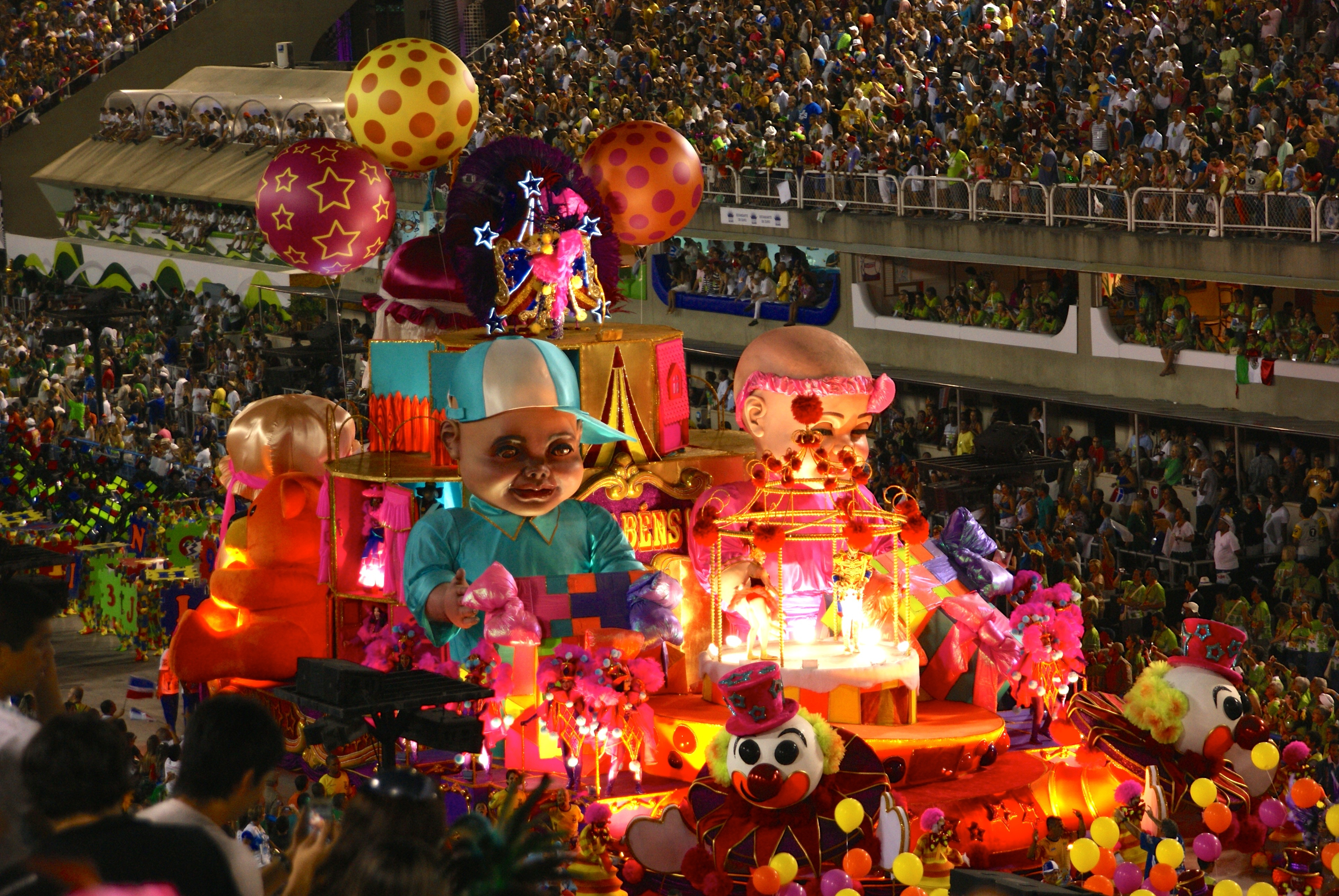 Carnival of Rio de Janeiro 2014